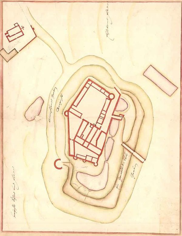 XVII sajand, plaan Rootsi Sõjaarhiivist.